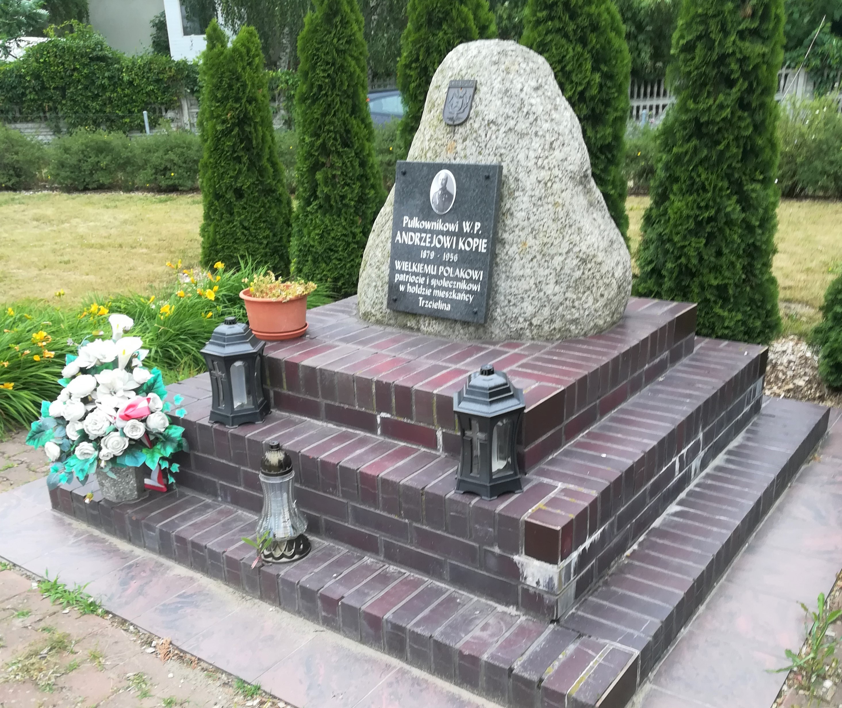 Trzcielin w pow. poznańskim.